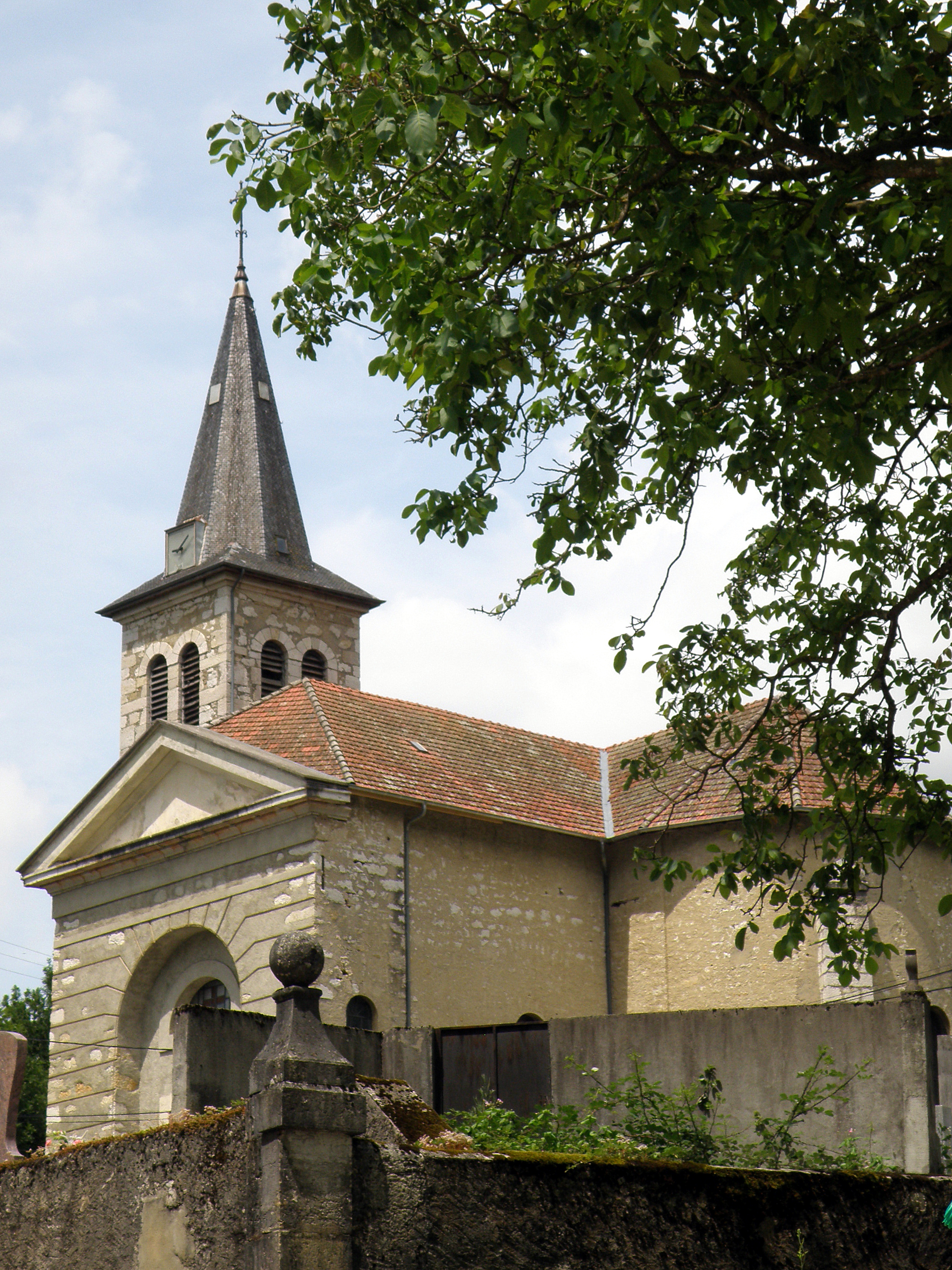 Saint-Jean-de-Chevelu, comm. du département de la Savoie (région Rhône-Alpes, France). Église paroissiale Saint-Jean-Baptiste.